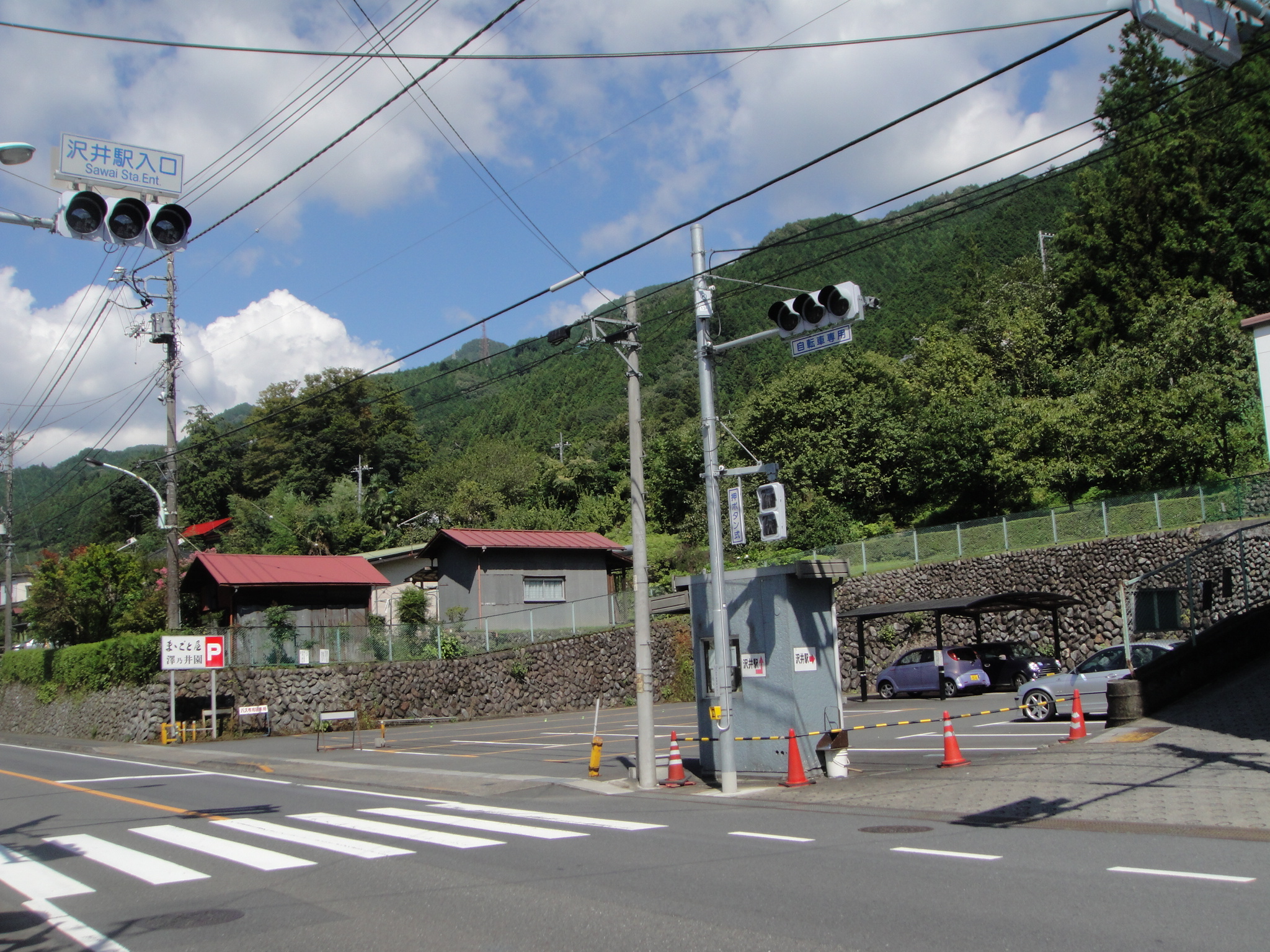 JR青梅線の沢井駅入口を撮影